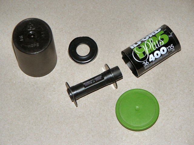 Motiv: Geöffnete Filmpatrone mit Spule und Filmdose Kamera: Minolta Dimage 7Hi